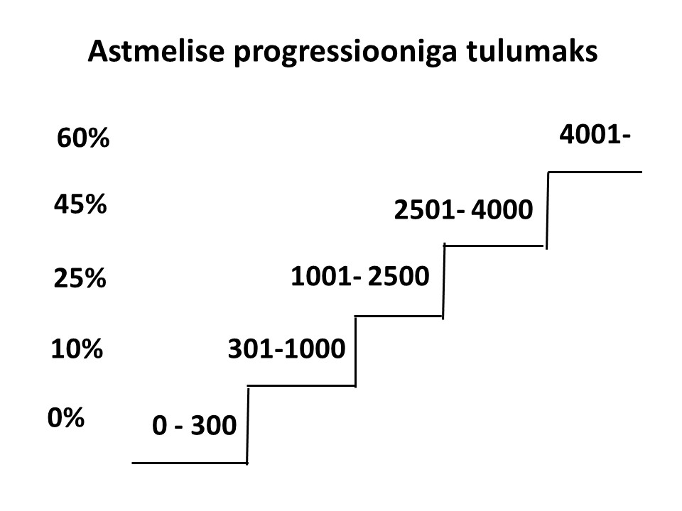 Astmeliselt tõusva maksumäära arvestus